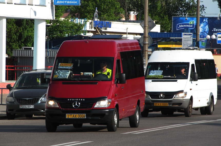 Маршрутное такси на улице Гомеля